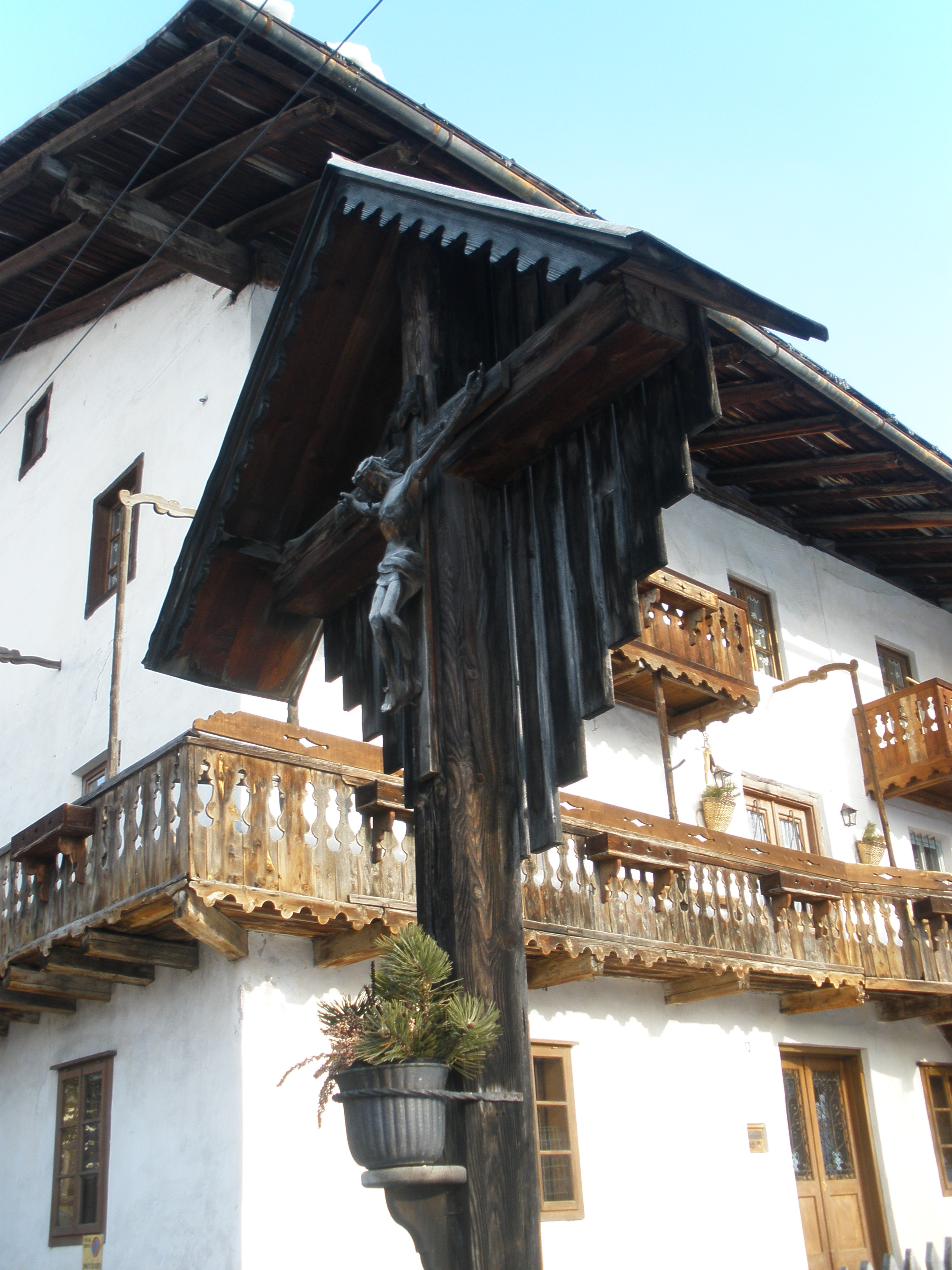 Un crocifisso in legno. Grava di Sotto (Cortina d'Ampezzo), Italia.